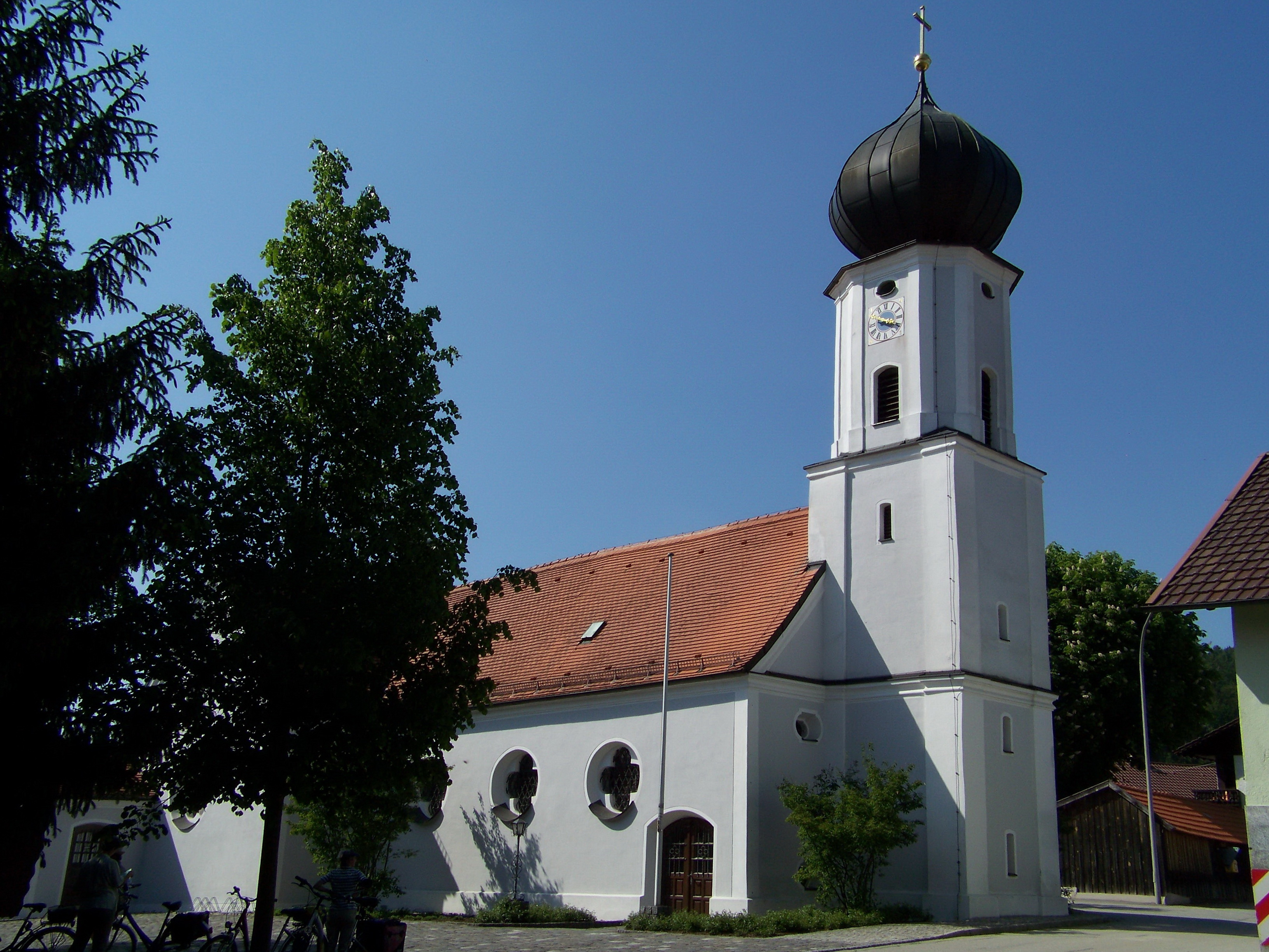 Wiesenfelden, Saulburg, Wiesenfeldener Straße 1. Katholische Filialkirche Maria Schnee in Anger, Langhaus und Turm 1698, Erweiterung 1922; mit Ausstattung.